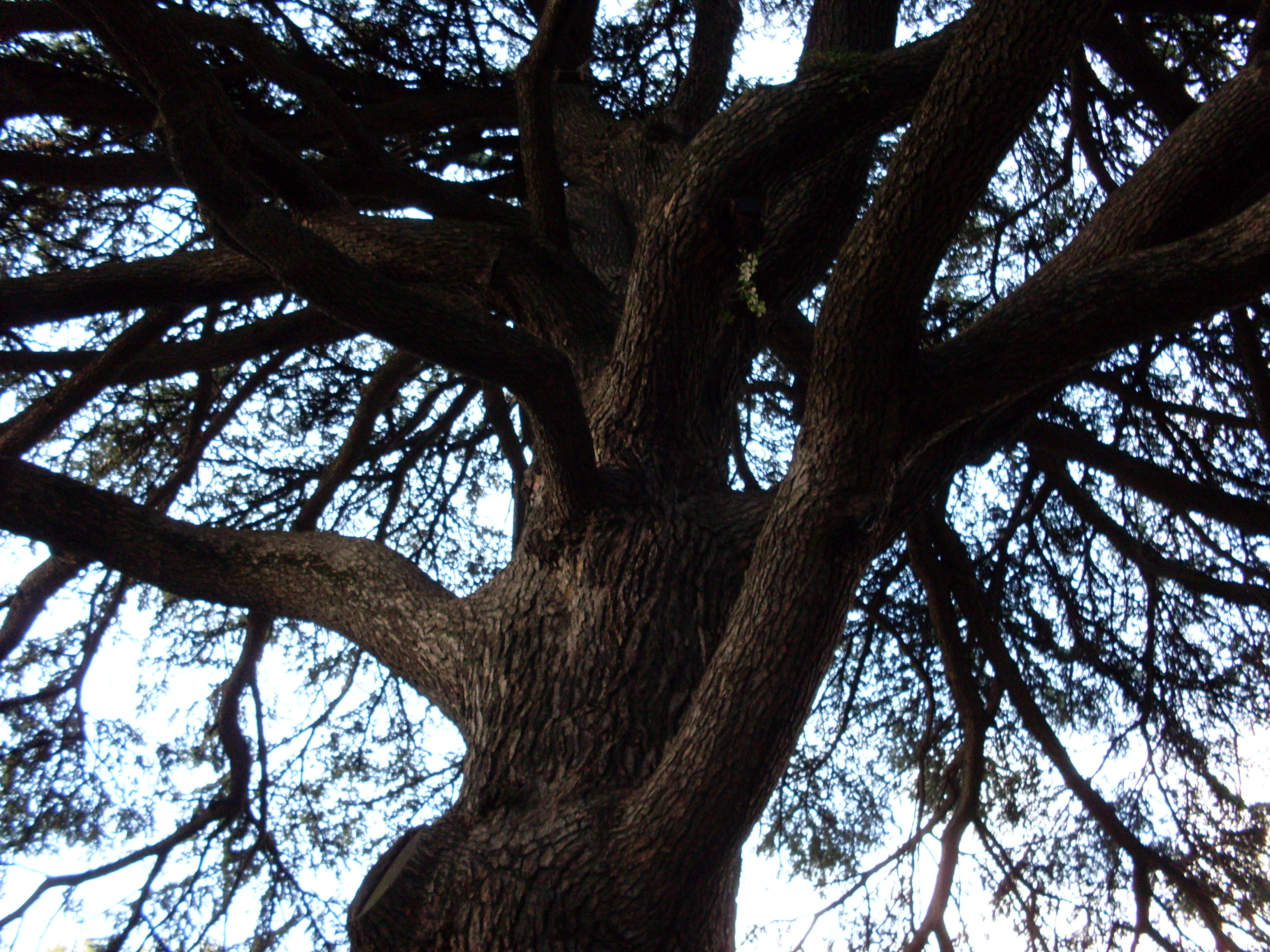 Le Palais Niel, cèdre du Liban, planté en 1866 alors qu'il avait 30 ans. Toulouse